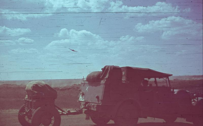 Einheit auf dem Marsch durch die Ukraine Sommer 1941